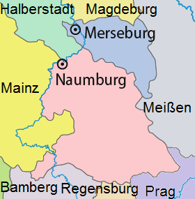 Bistümer Merseburg und Naumburg vor der Reformation (Diözesangrenzen)